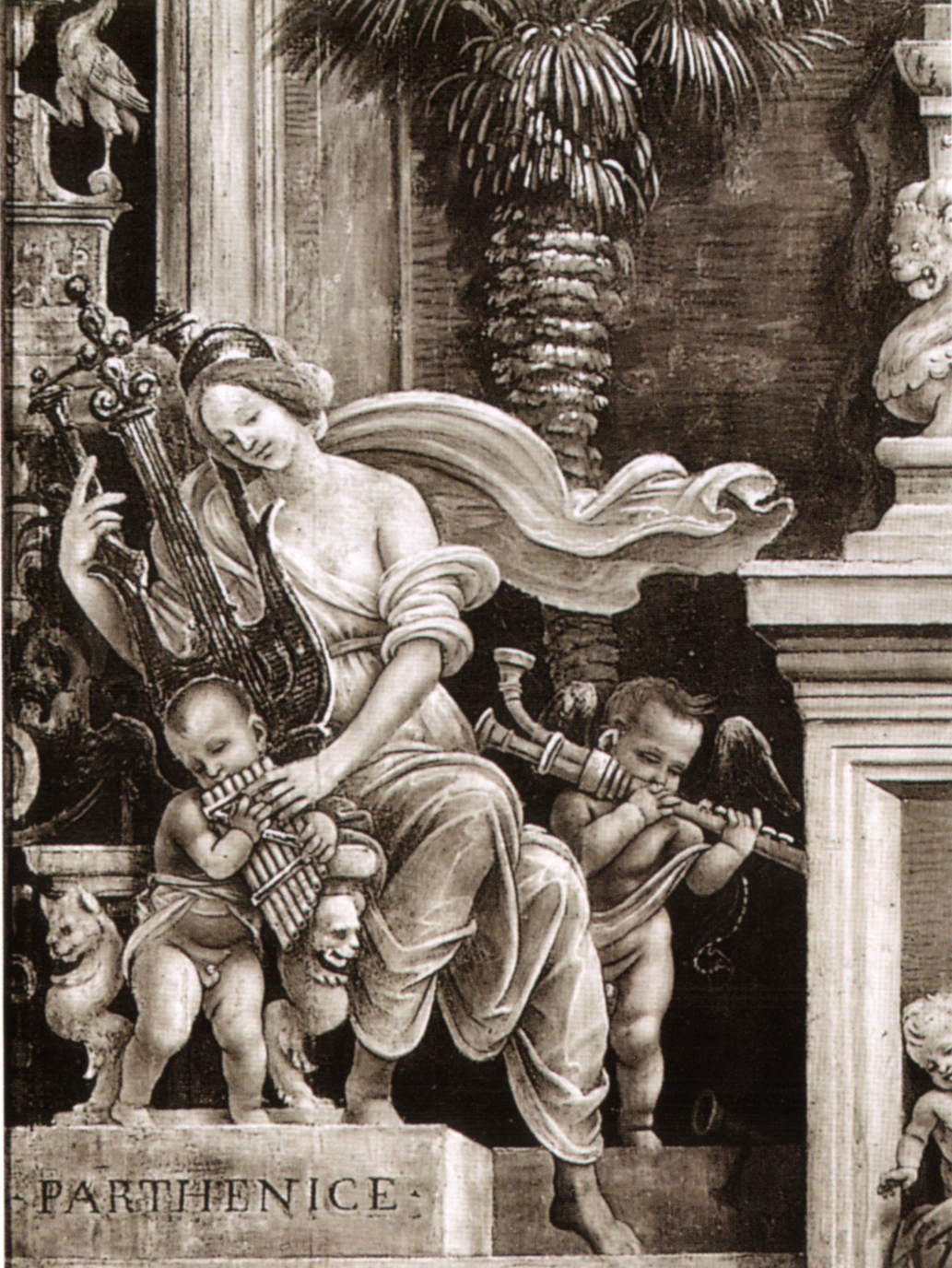 LIPPI, Filippino Fresco Strozzi Chapel, Santa Maria Novella, Florence